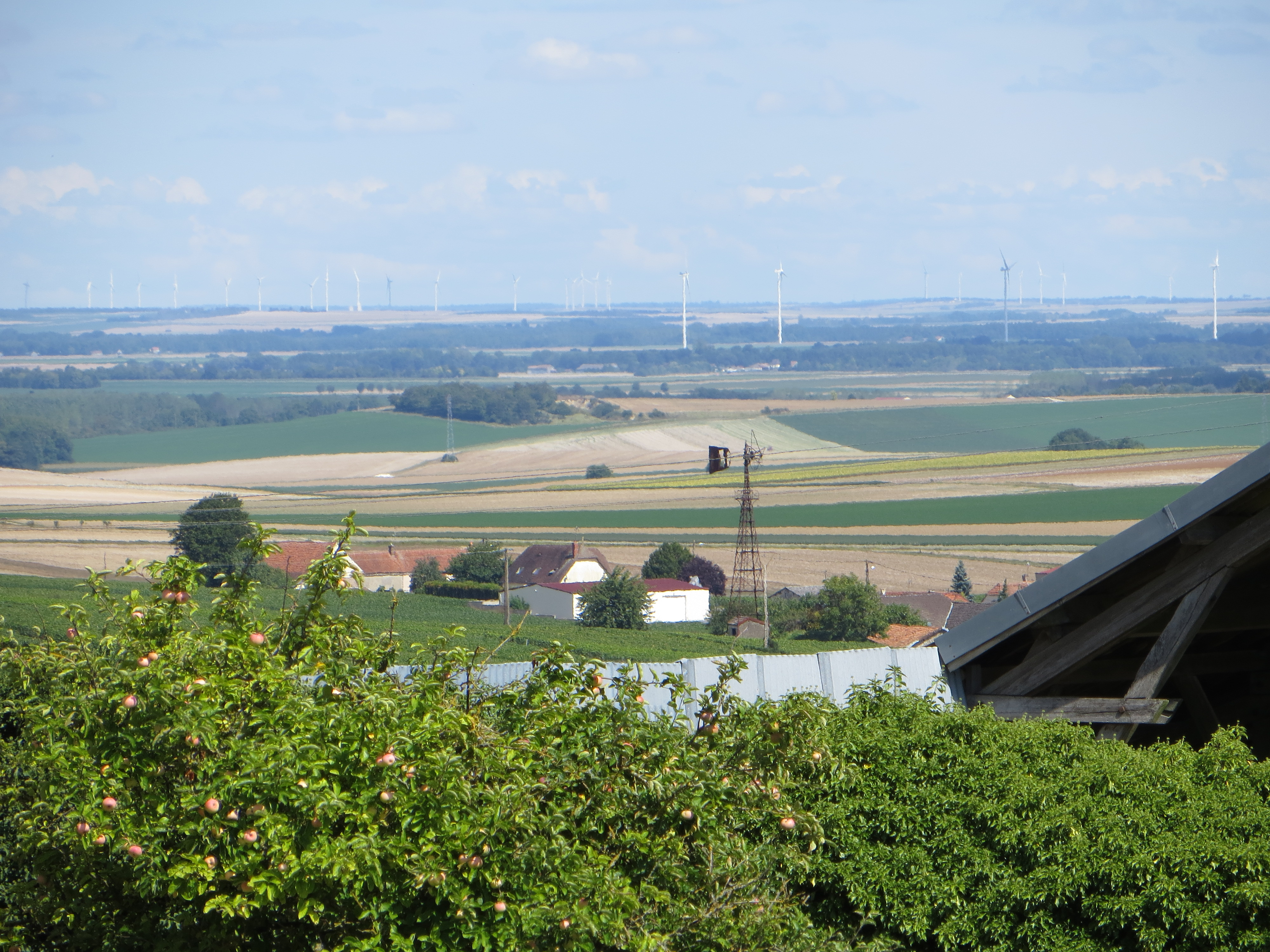 Une éolienne rouillée devant un parc d'éoliennes neuves